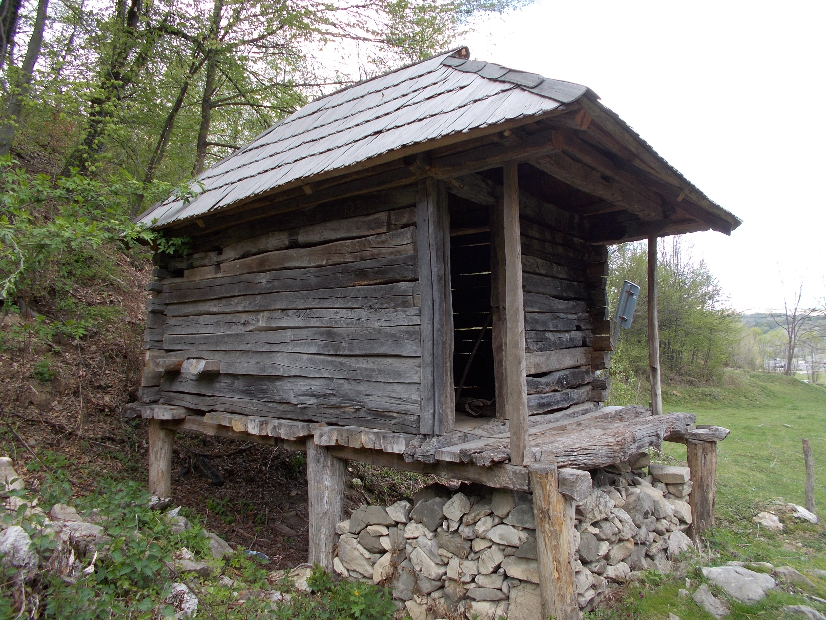 Moara Crăcucenilor (moară de lemn cu ciutură), Ponoarele, județul Mehedinți